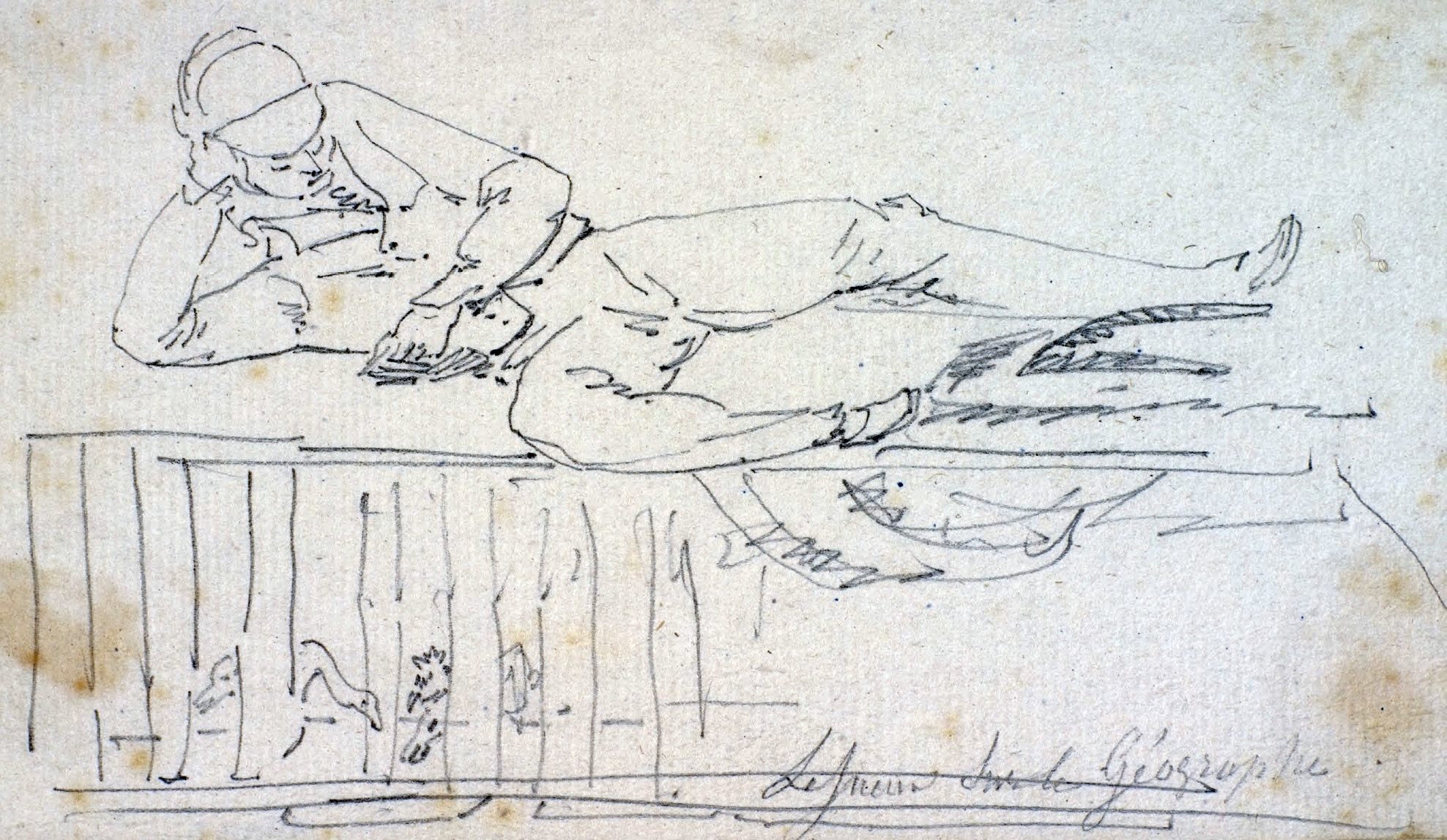 Self portrait of Charles-Alexandre Lesueur, sitting on a cage containing a bird in le Géographe.